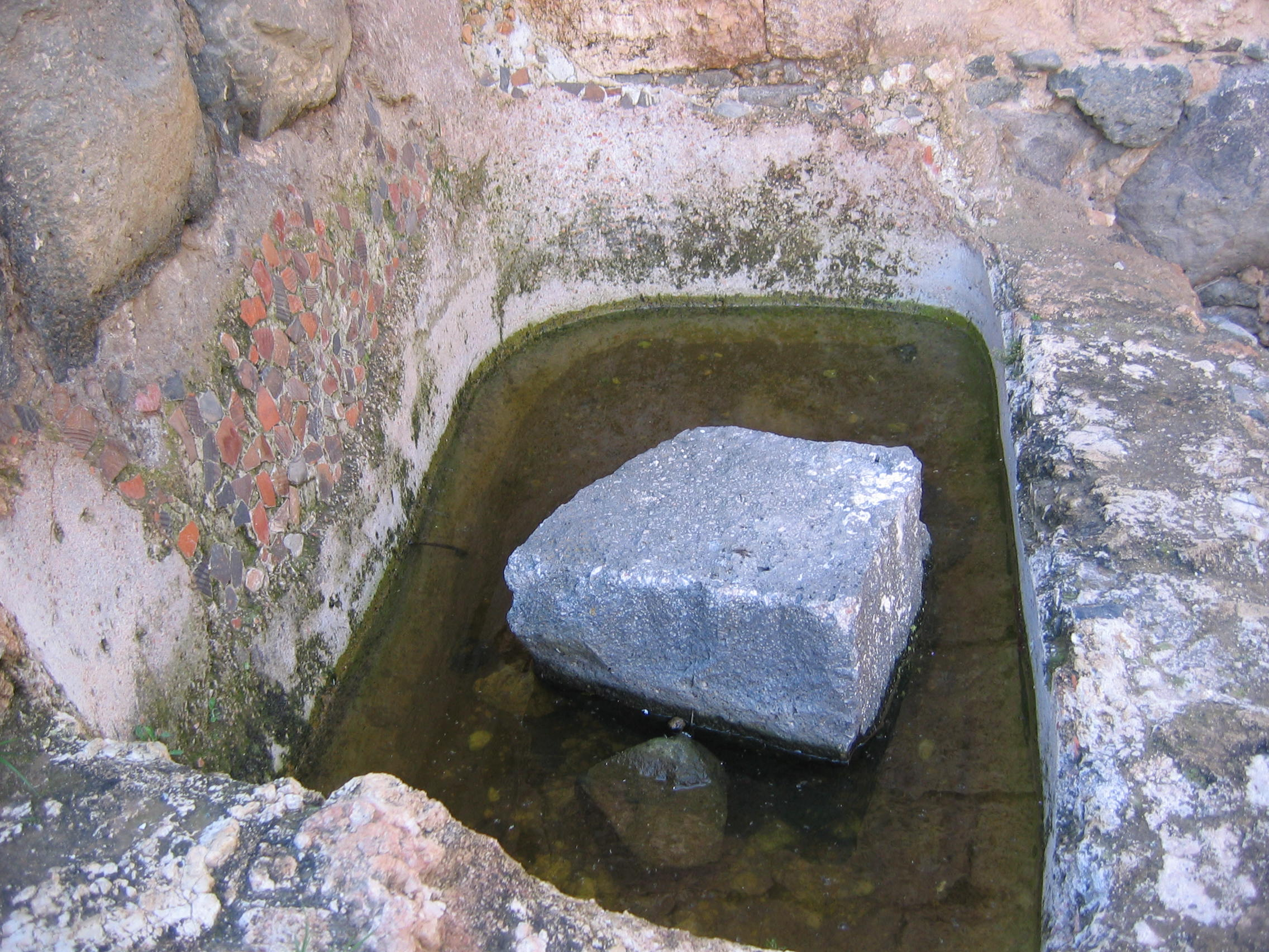 באר במבצר כוכב הירדן.